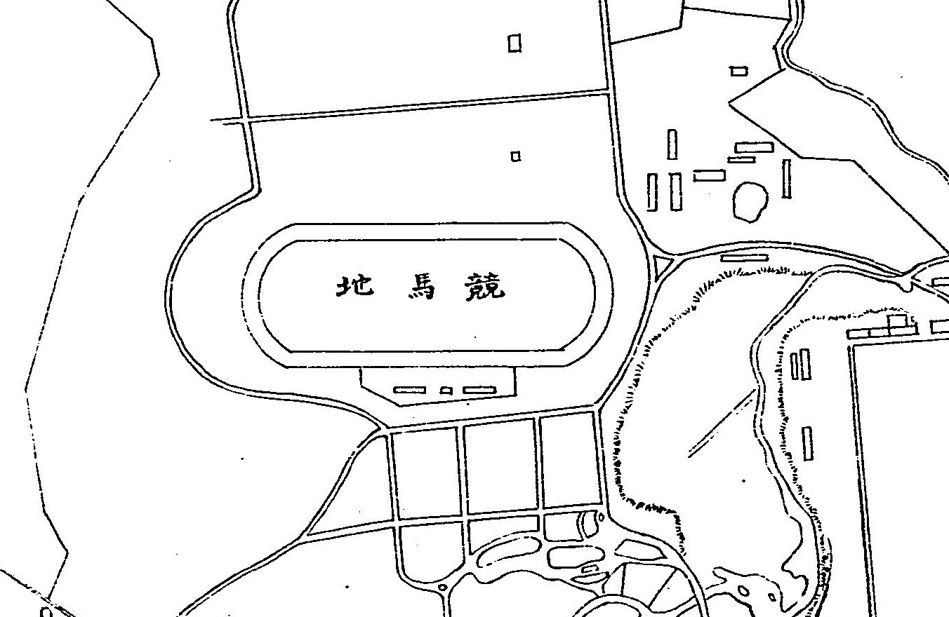 札幌育種場競馬見取り図